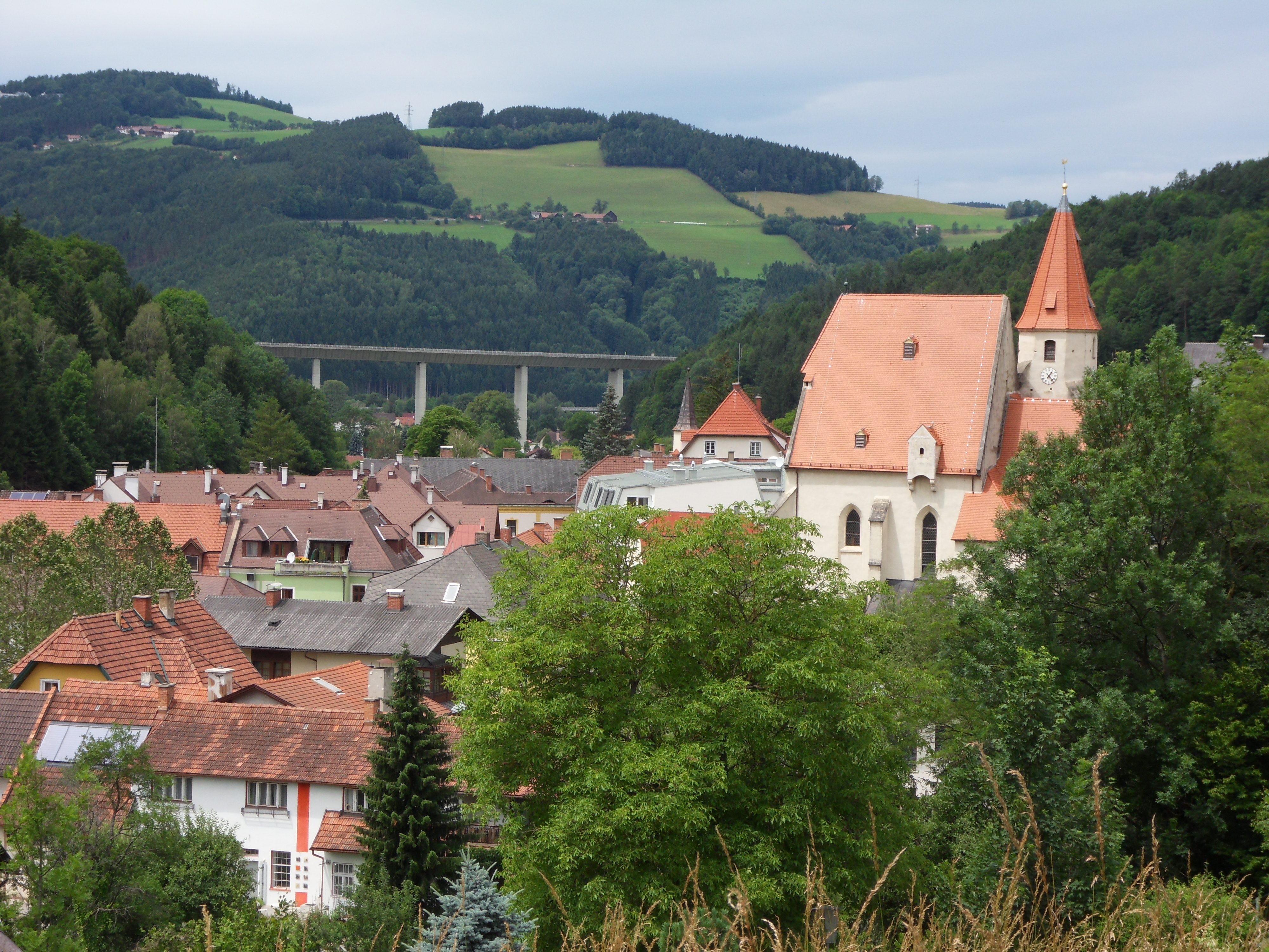 Marktgemeinde Edlitz in Niederösterreich mit Pfarrkirche